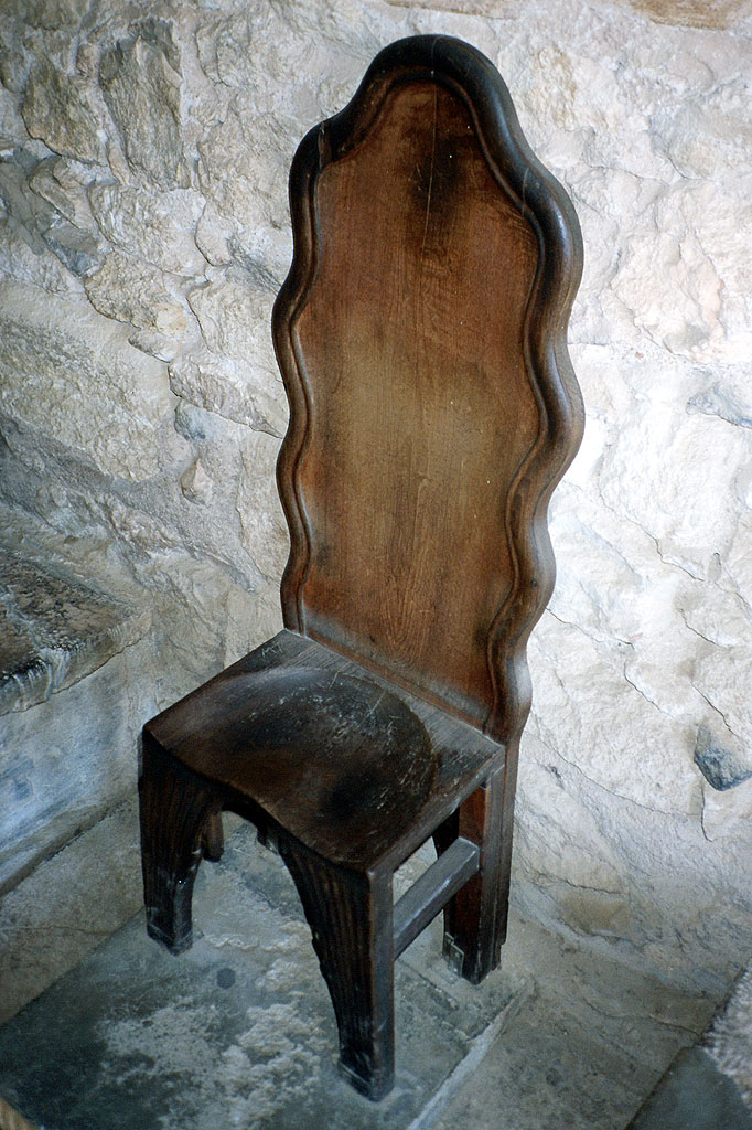 Holz-Replik des gefundenen Alabasterthrons von Knossos